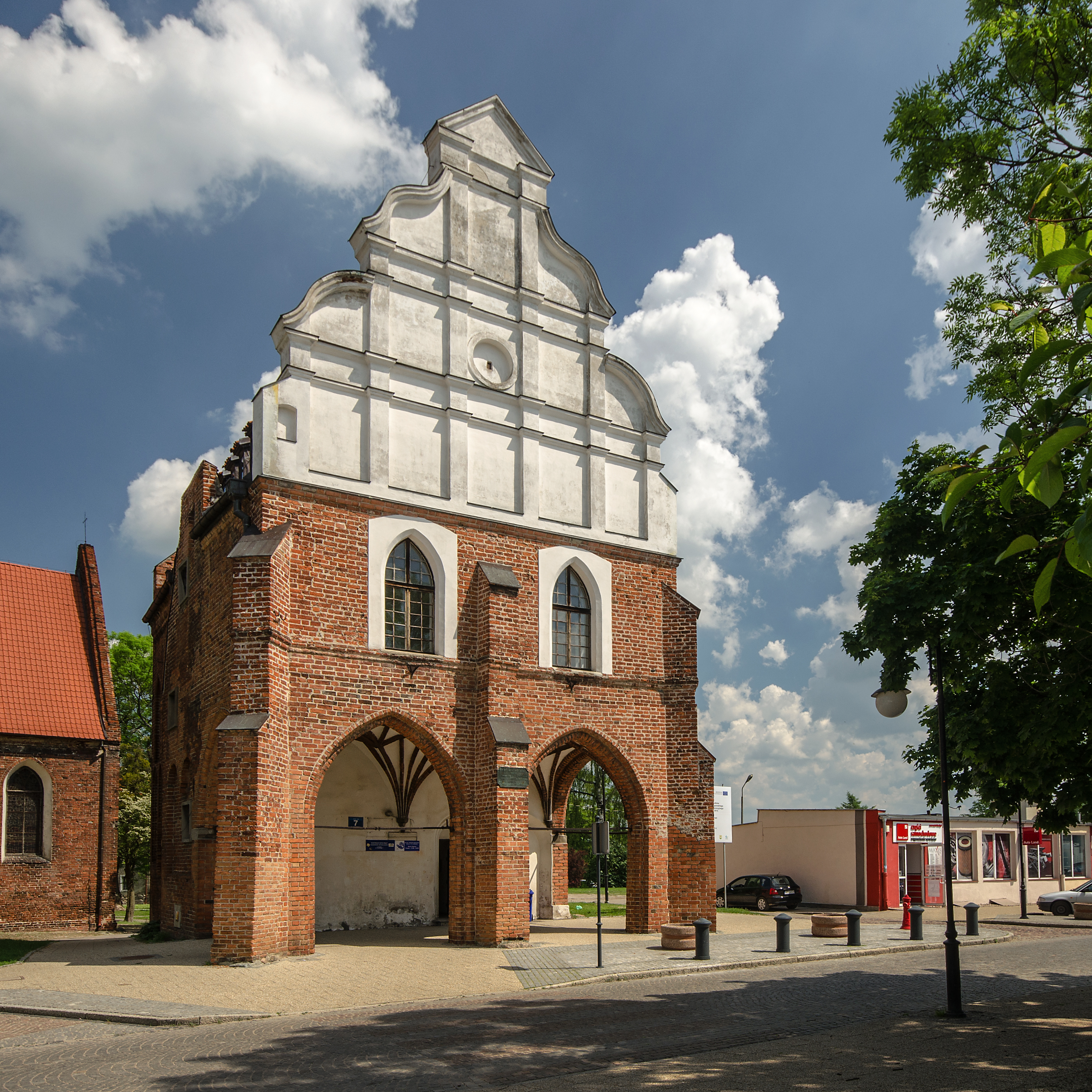 Pasłęk, ratusz, kon. XIV, XVI